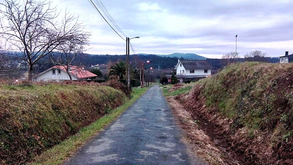 Vista dos Novás, Pedroso, Narón.